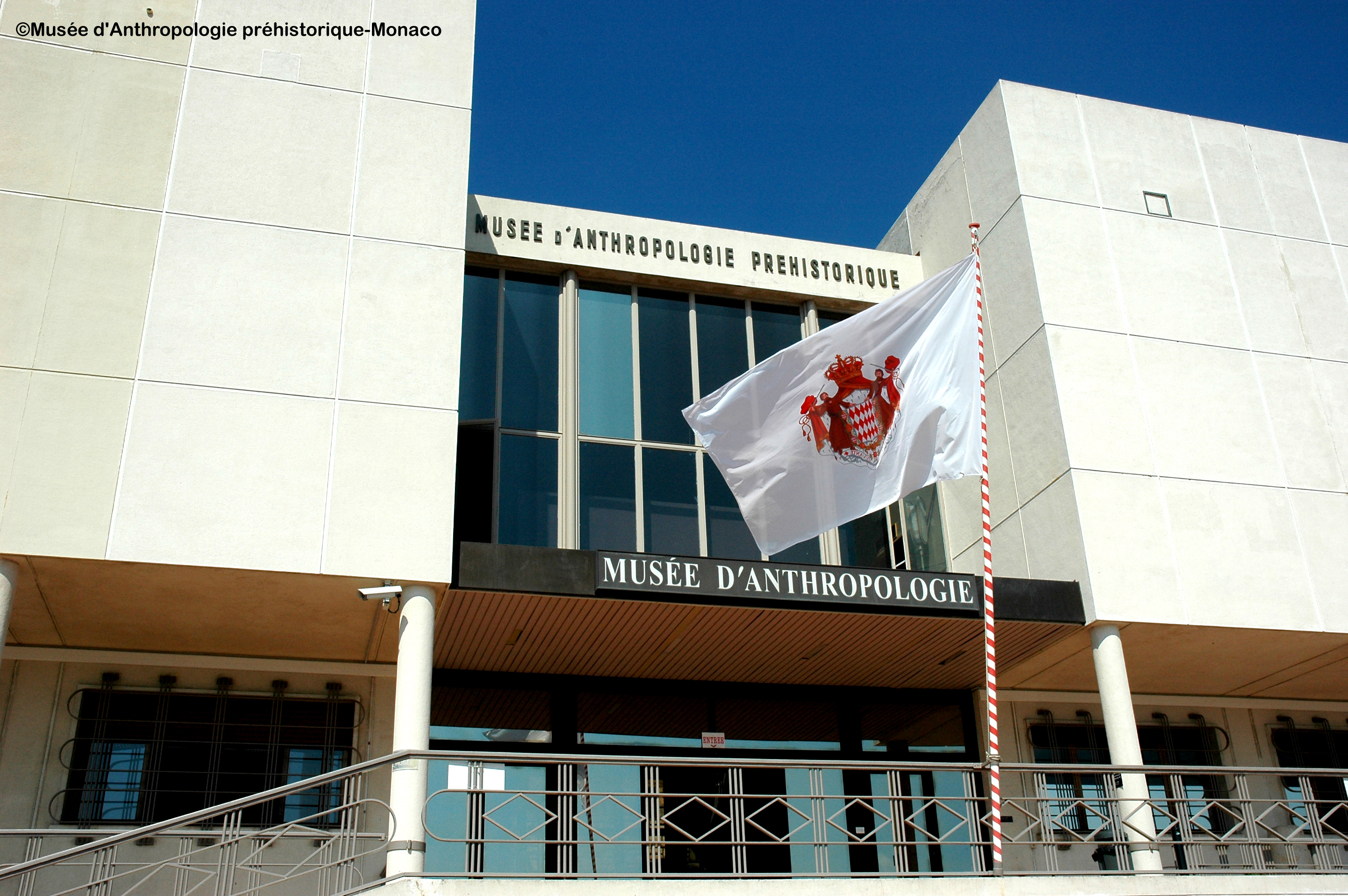 Au coeur du Jardin exotique